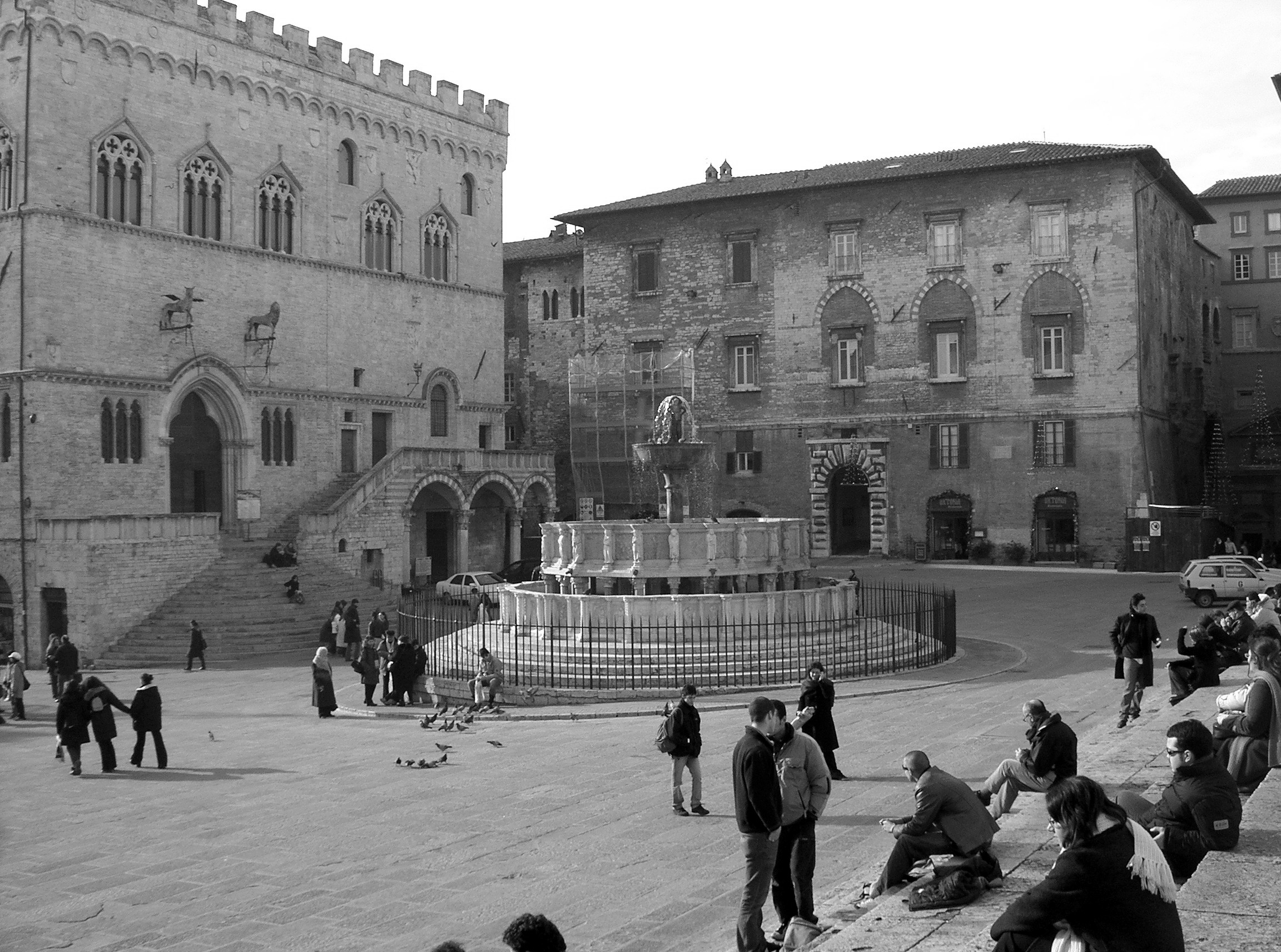 "Settembre in piazza" a Perugia, in Piazza IV Novembre.